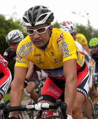 Félix Cárdenas, en la 2ª etapa de la Vuelta a Colombia 2012